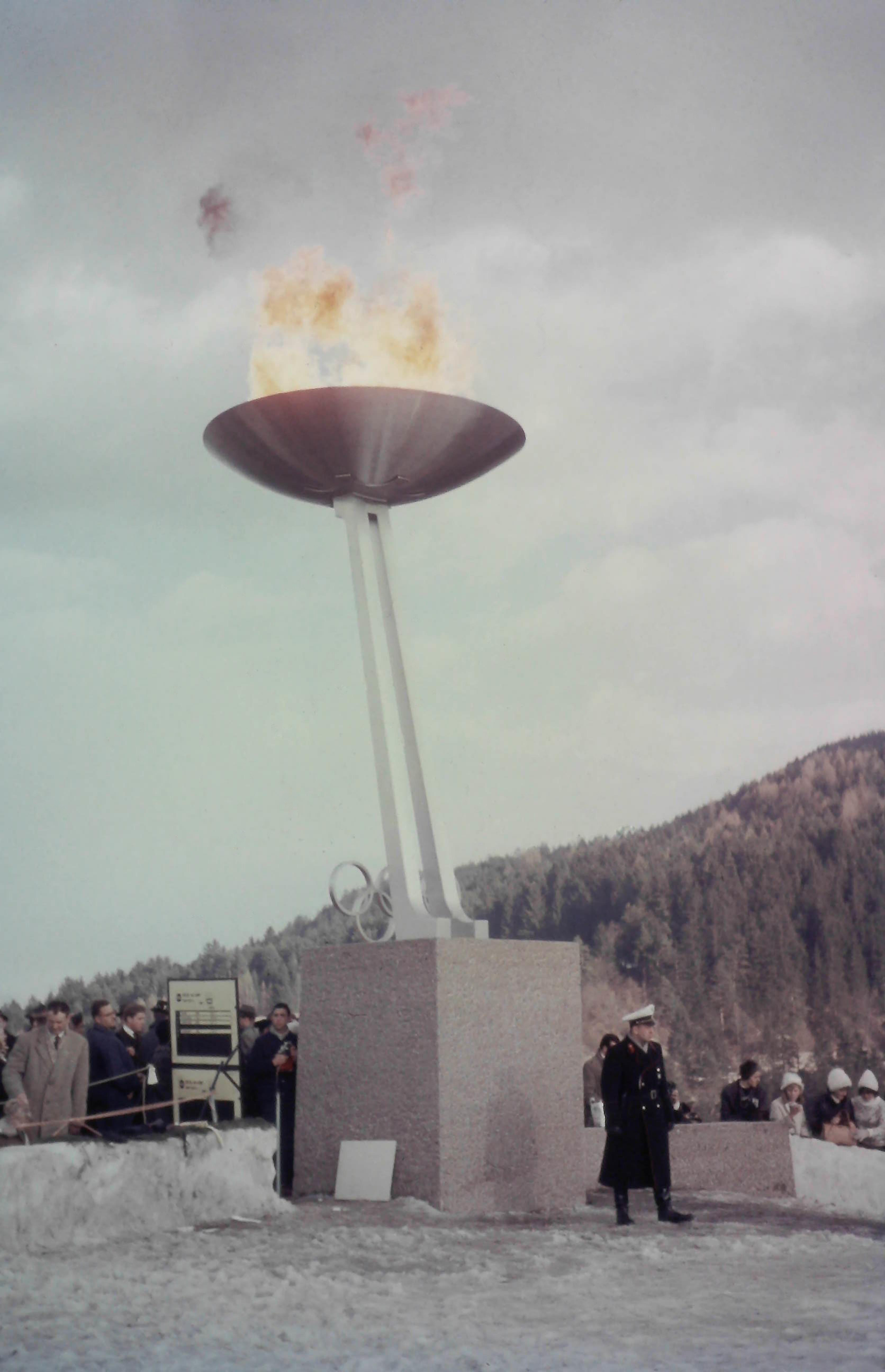 Das olympische Feuer, aufgenommen bei den olympischen Winterspielen in Innsbruck 1964.